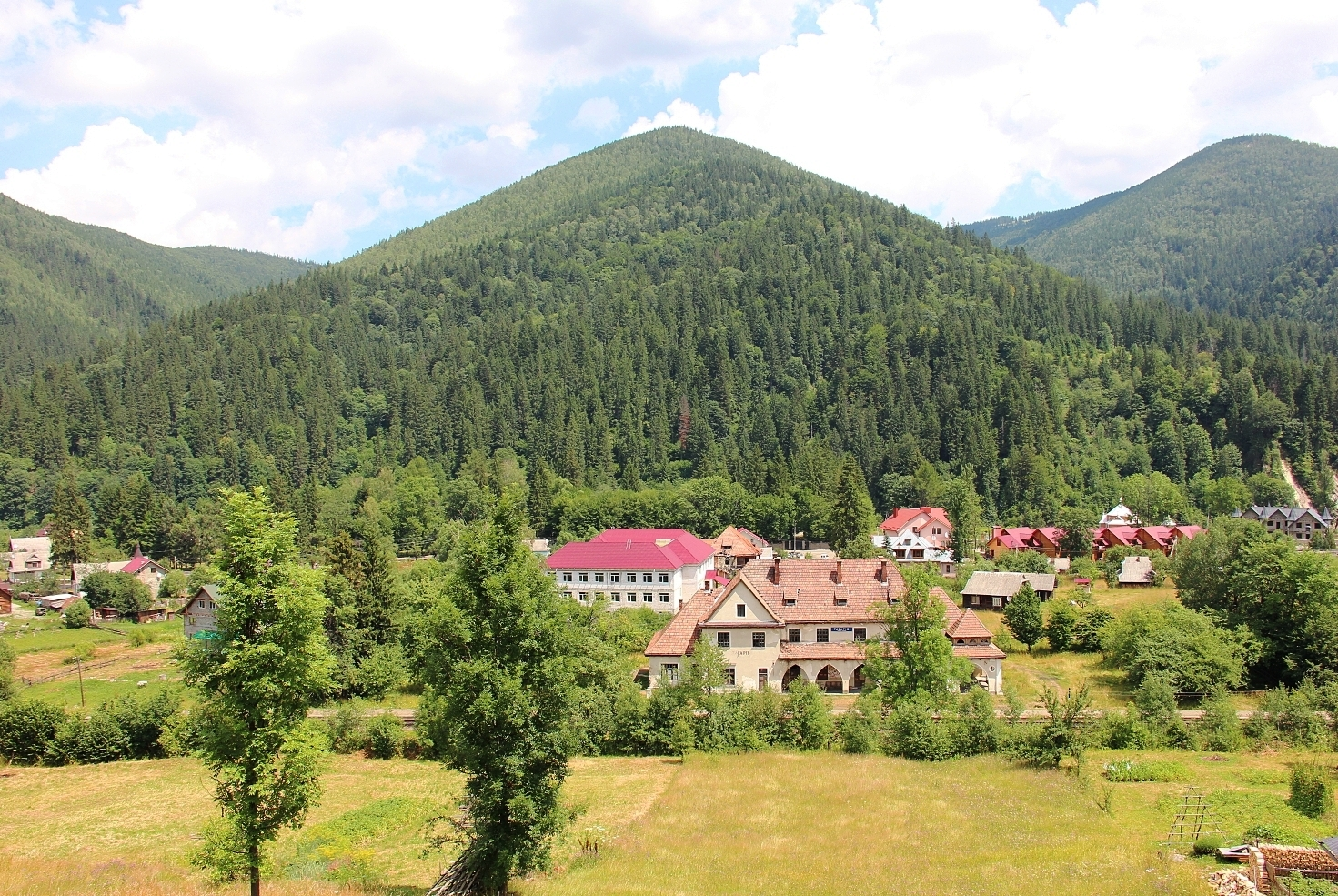 Татарів, залізнична станція